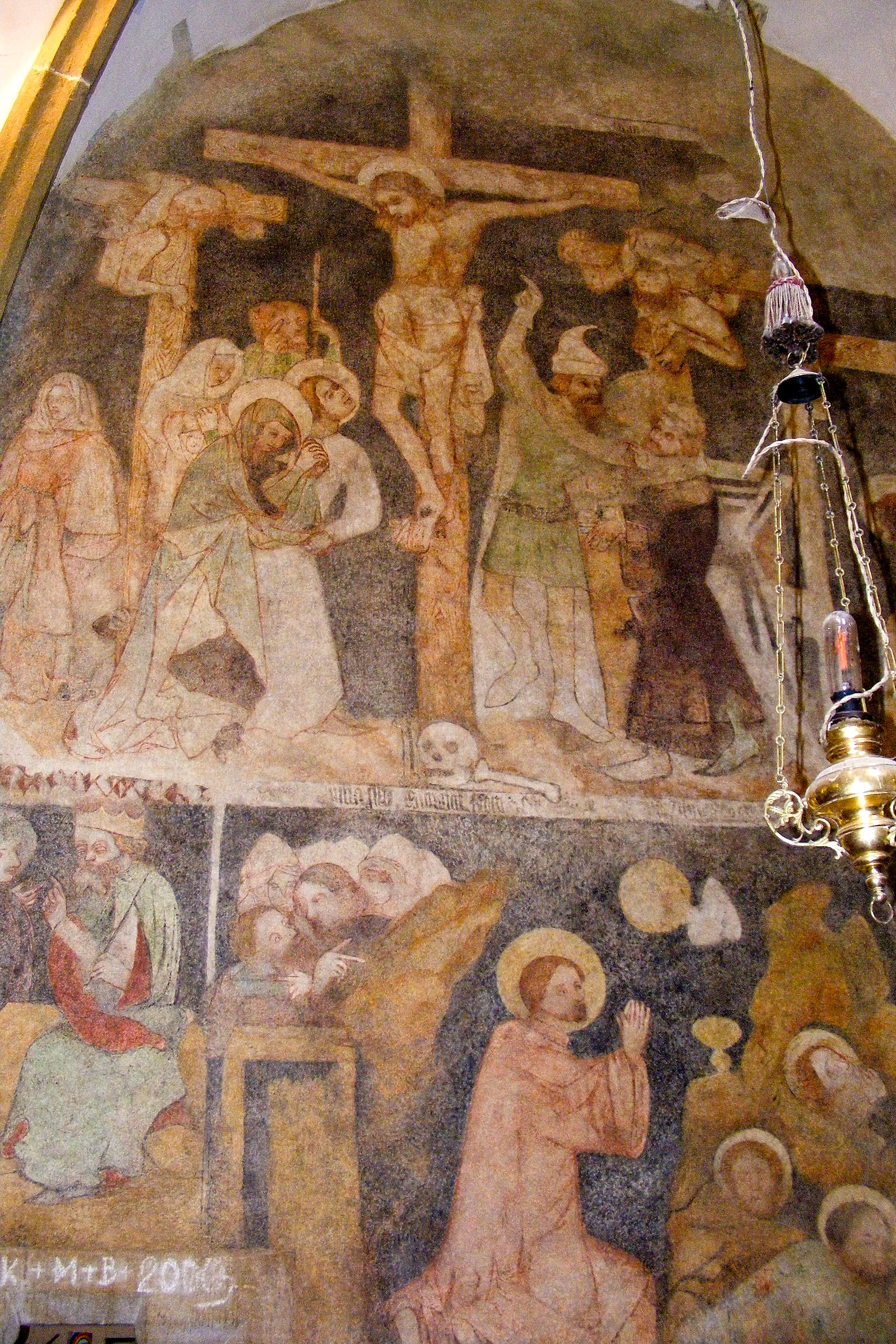 Gotická nástěnná malba, kostel sv. Vavřince, Strašice, cca 1380